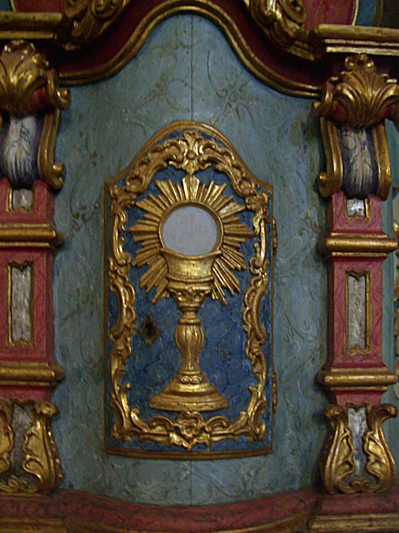 Detalhe da talha em madeira, pintada e dourada, do altar de Nossa Senhora do Carmo, na Igreja de Nossa Senhora do Rosário e São Benedito, Cuiabá, Mato Grosso, Brasil.